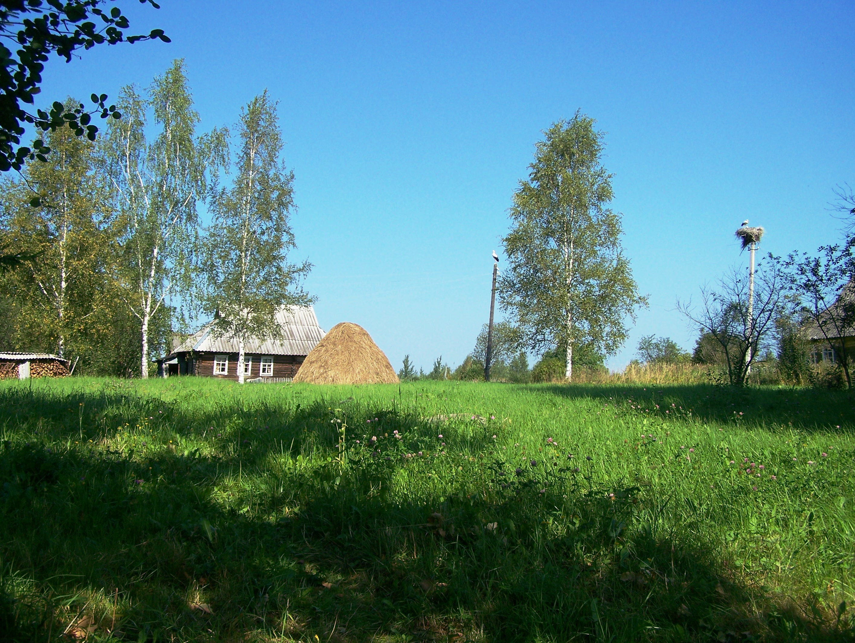 Деревня Фешково, август 2007 года.